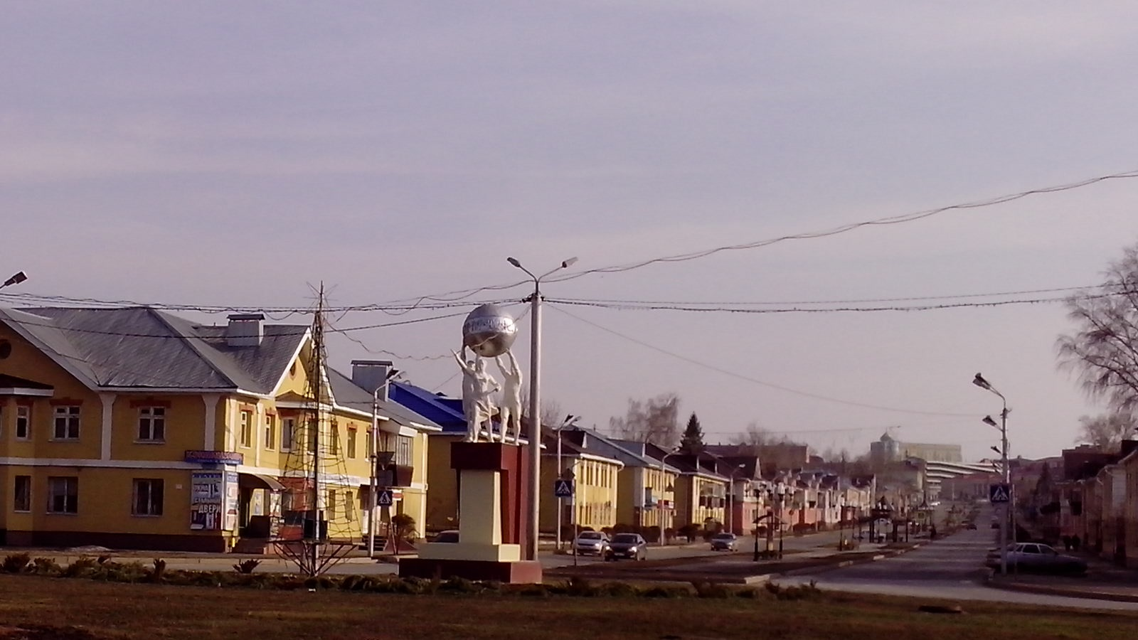 На переднем плане воздвигнутый в 1955 г. первый городской монумент «Миру — мир!» работы скульптора С. Л. Савицкого